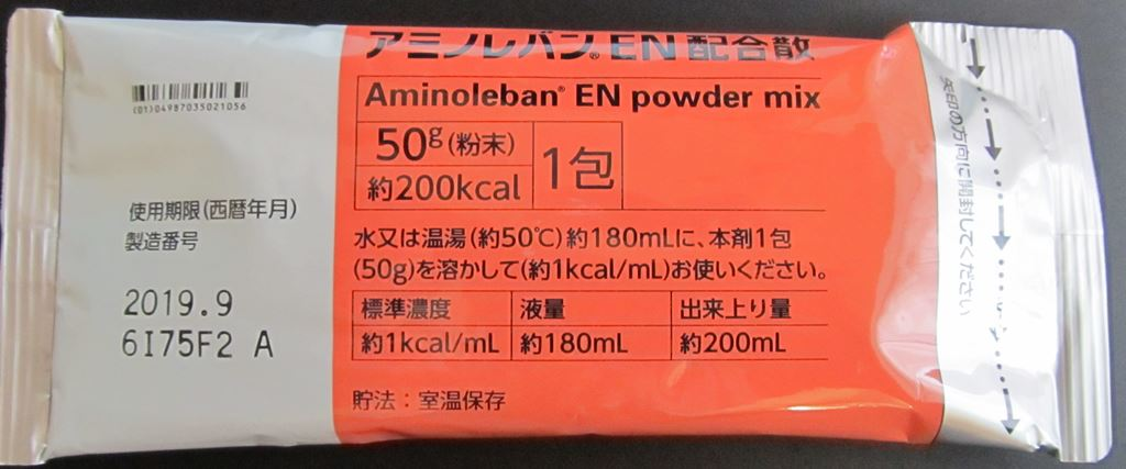 アミノレバンEN